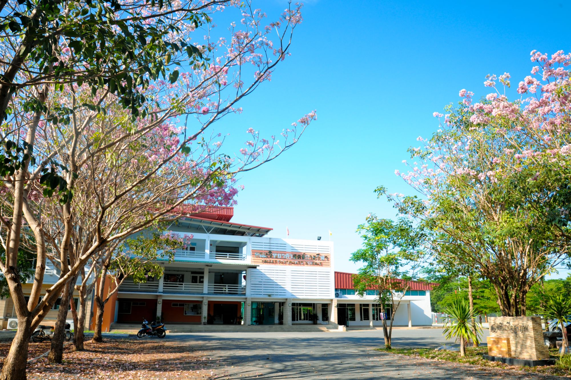 ภาพหน้าคณะวิทยาศาสตรืการกีฬา มหาวิทยาลัยเกษตรศาสตร์ วิทยาเขตกำแพงแสน